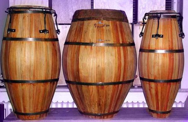 Fotografia de los instrumentos del Candombe de Uruguay, llamados "chico", "repique " y "piano". Tomada en el Taller El Power, Carlos Gardel 1017, Montevideo